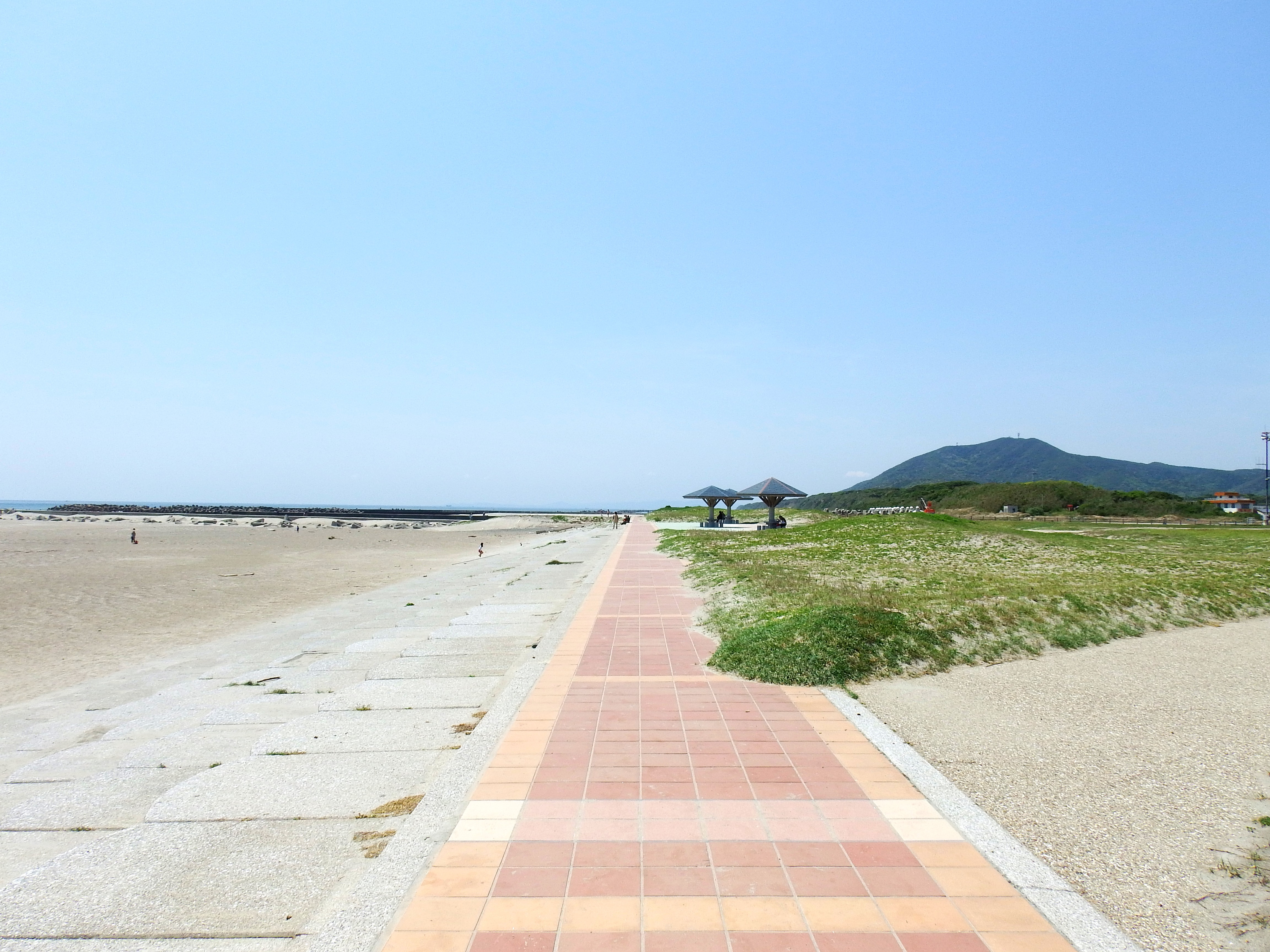 赤羽根ロコステーション